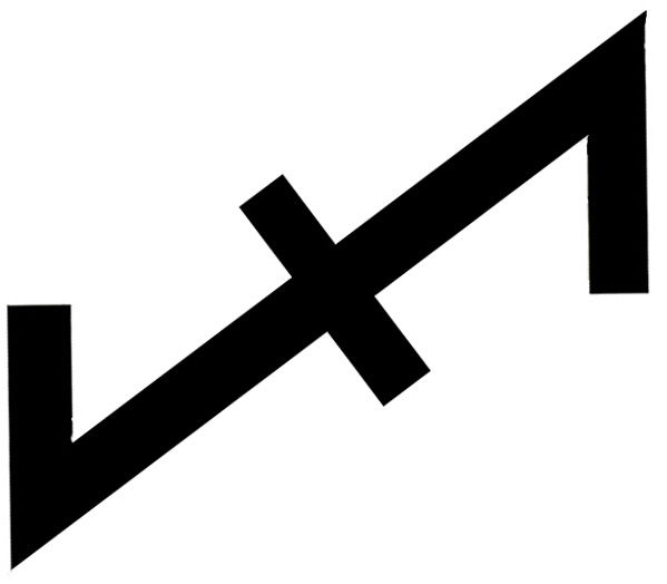 Znak Werwolf'u - Werwolf symbol.